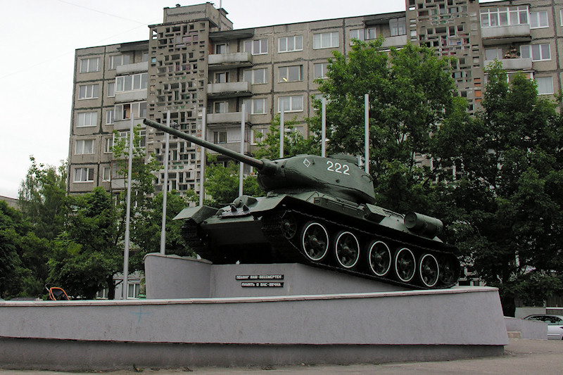 Танк-памятник Т-34 на улице Генерала Соммера. Текст на постаменте: «Подвиг ваш — бессмертен. Память о вас — вечна» (спереди) и «При штурме и взятии города-крепости Кёнигсберг 6-9 апреля 1945 года проявили беспримерный героизм советские воины-танкисты. Этот танк Т-34 — непосредственный участник боёв за город. Установлен на пьедестал в знак поклонения калининградцев подвигу героев-танкистов.»